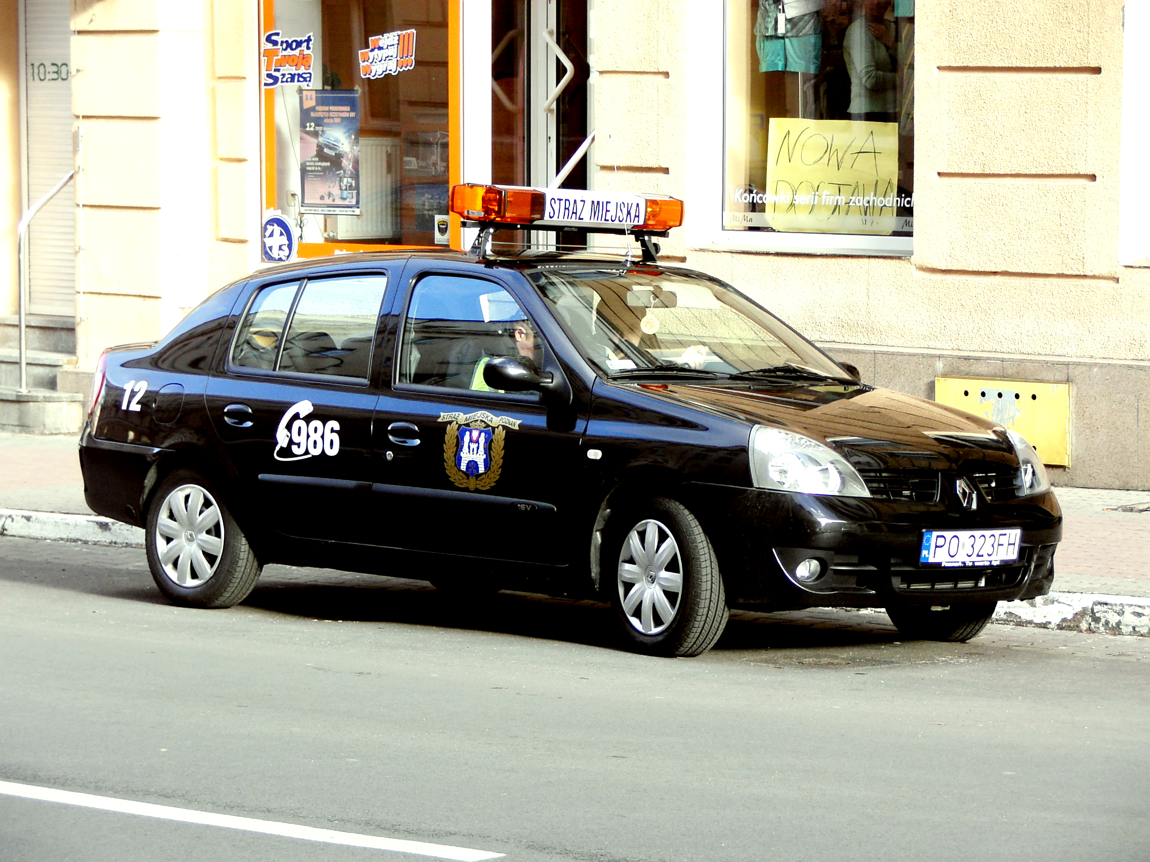 Wóz Straży Miejskiej w Poznaniu (Straż miejska Poznań - nowe malowanie obowiązujące od listopada 2007)